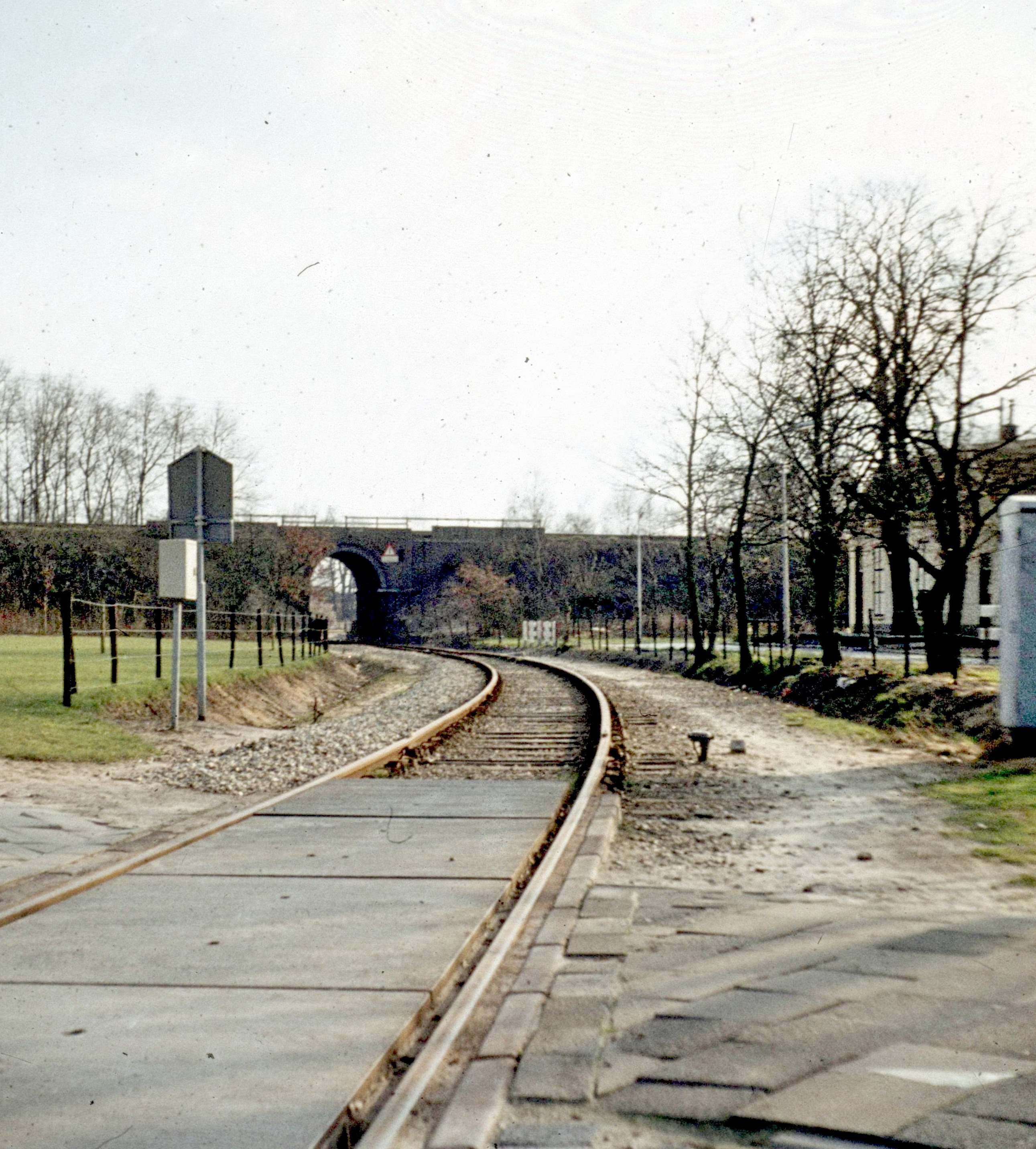 De lijn vanaf Boekelo richting Enschede Noord met in de verte de tunnel in de kruising met de spoorlijn Hengelo-Enschede,foto ca. 1978